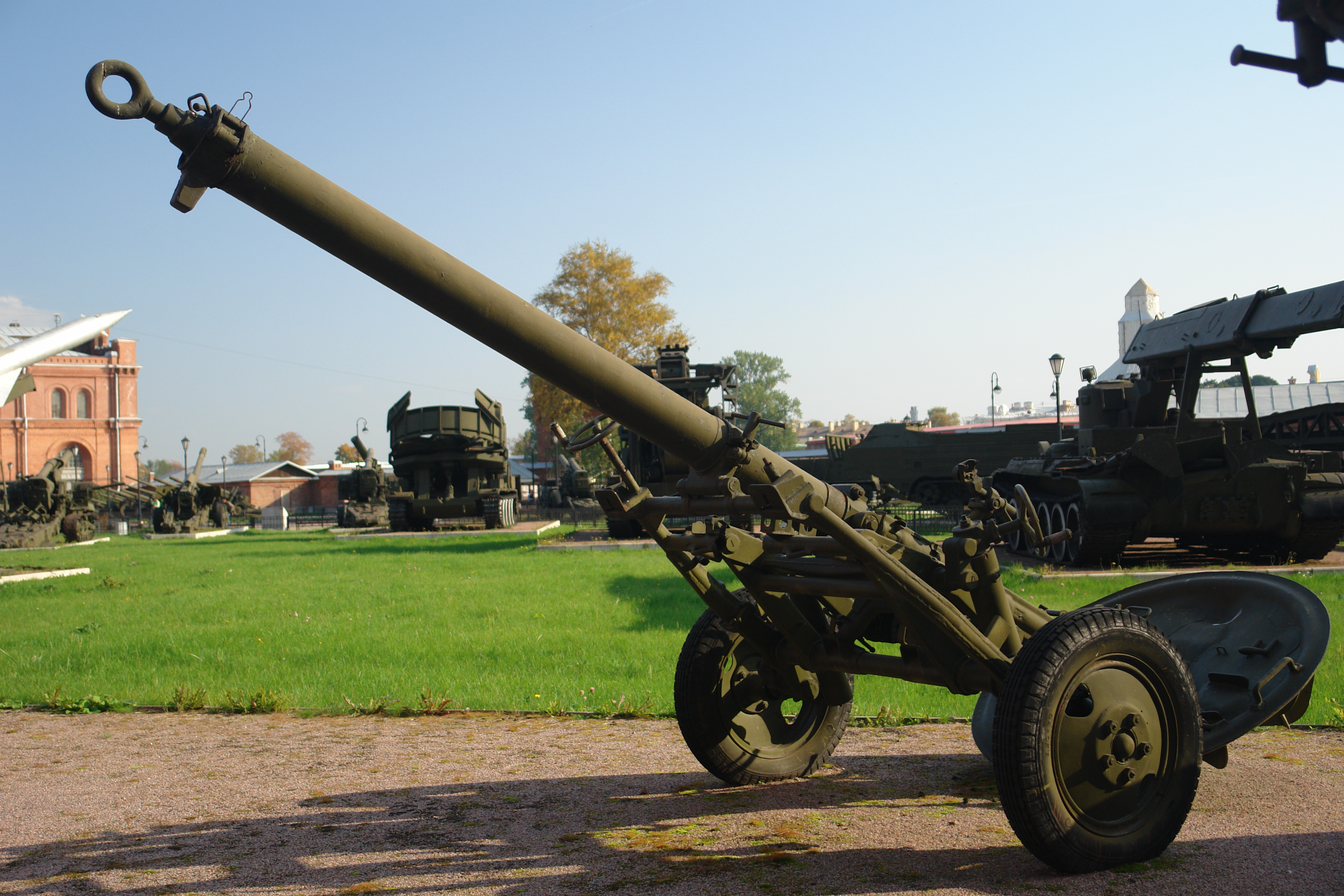 160-мм МИНОМЕТ М-160 (1949) ГЛАВНЫЙ КОНСТРУКТОР Б.И.ШАВЫРИН. ДАЛЬНОСТЬ СТРЕЛЬБЫ - 8040 м. СКОРОСТРЕЛЬНОСТЬ - 3 ВЫСТР/МИН МАССА, КГ: МИНОМЕТА - 1300, МИНЫ - 41. Военно-исторический музей артиллерии, инженерных войск и войск связи, Санкт-Петербург.